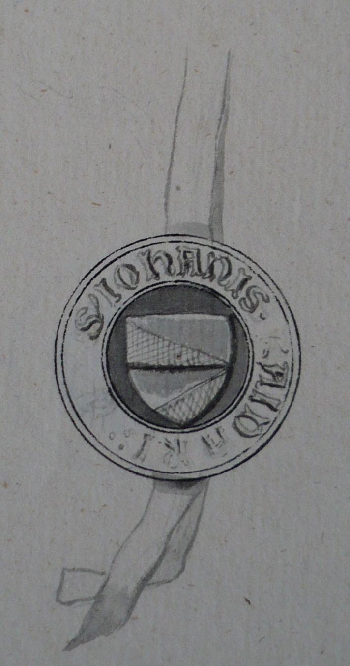 Seglet til Jon Darre som var riksråd og lensherre i Tønsberg. Seglet er fra 1401 og er fra Jacob Langebæks samling i det danske Rigsarkivet i København, pakke XV.